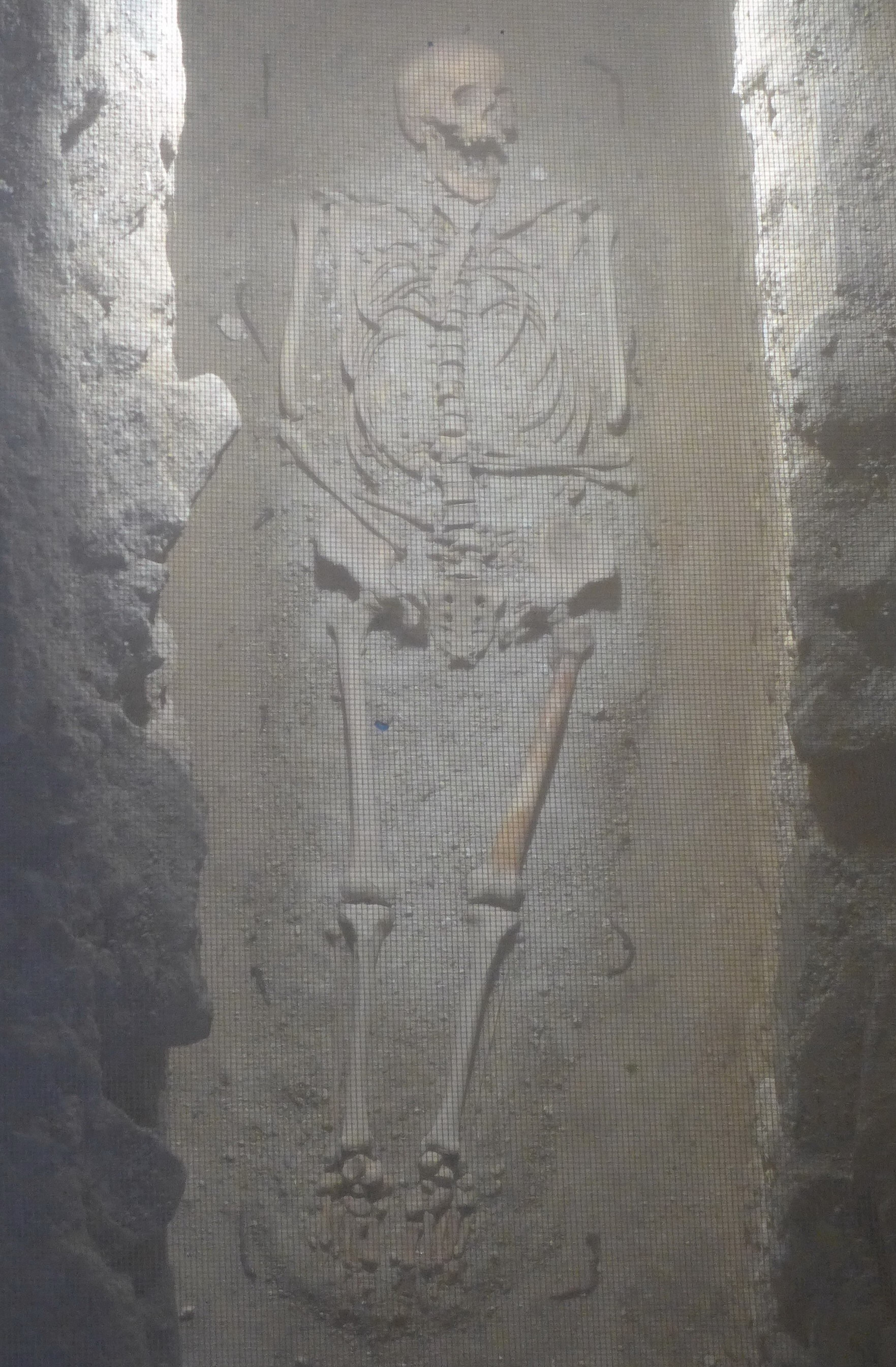 Stift Rein - Grabmal Markgraf Leopold I.